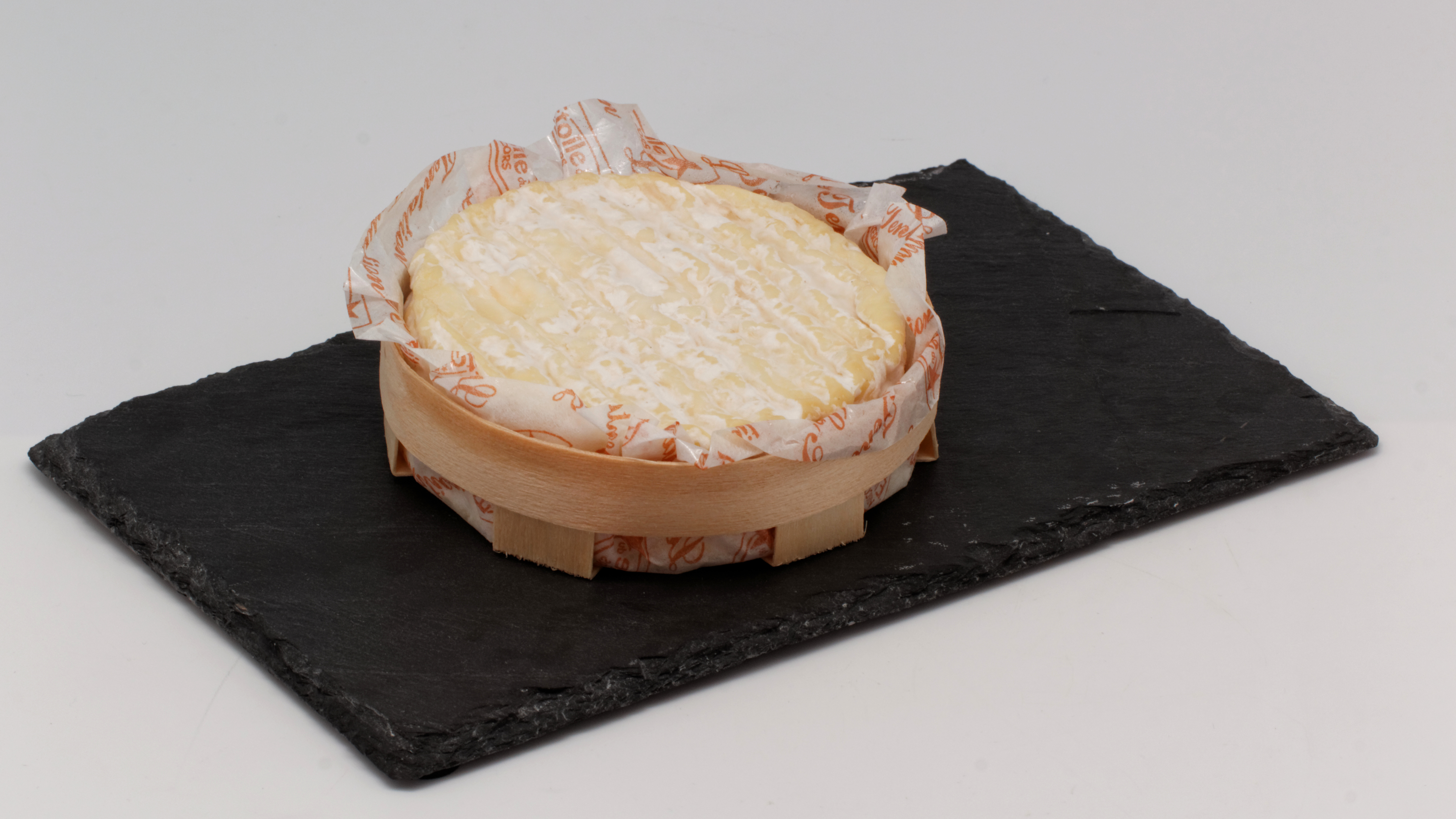 Tentation du Vercors ; Androuet 17e